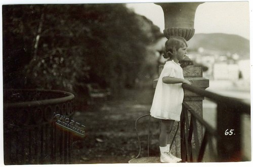 A Princesa Adelheid (* 3. Jänner 1914; † 2. Oktober 1971), getauft Adelheid Maria Josepha Sixta Antonia Roberta Ottonia Zita Charlotte Luise Immakulata Pia Theresia Beatrix Franziska Isabella Henrietta Maximiliana Genoveva Ignatia Marcus d’Avian, 1922